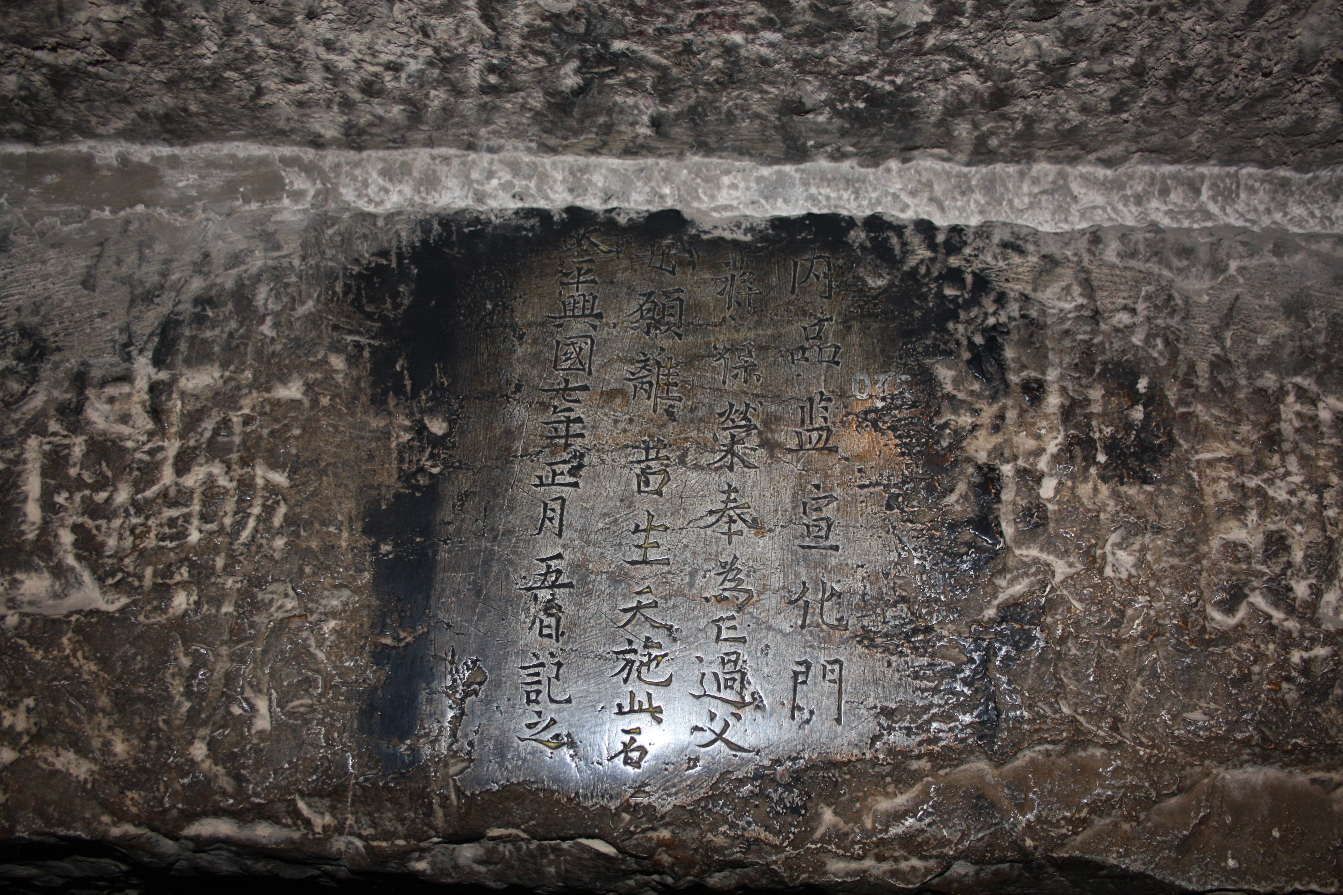 河南开封繁塔内刻有捐助人信息的石刻——“内品监宣化门 蒋保荣 奉为 亡过父母 愿离苦生天 施此石 太平兴国七年正月五日记之”，记录了此塔的修建时间。